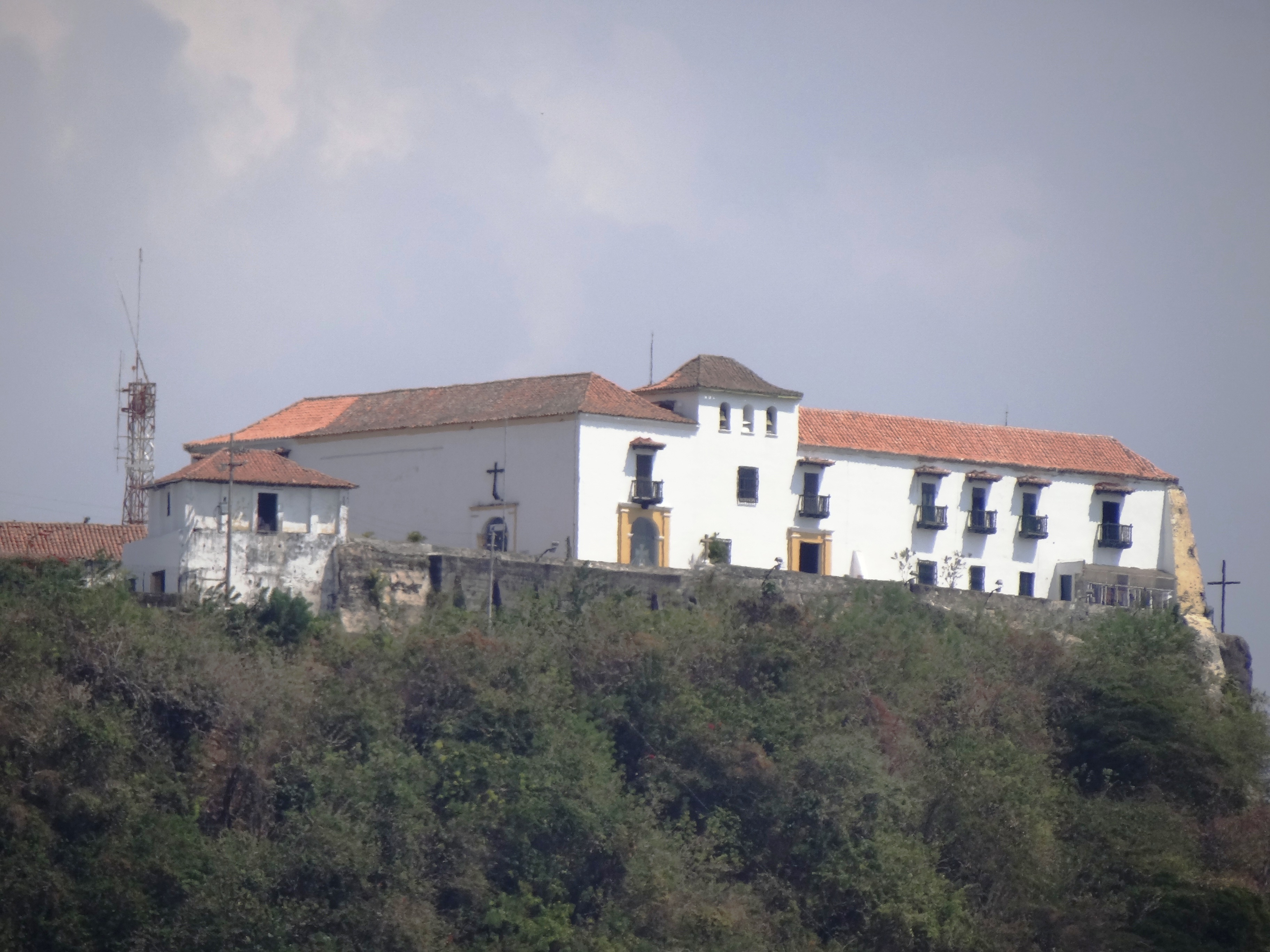 Convento de la Popa en Cartagena, departamento de Bolívar, Colombia